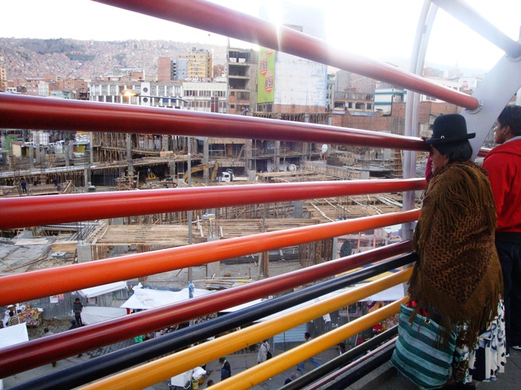 Vecinos observando la construcción del Mercado Lanza desde la PasarelaPërez Velasco